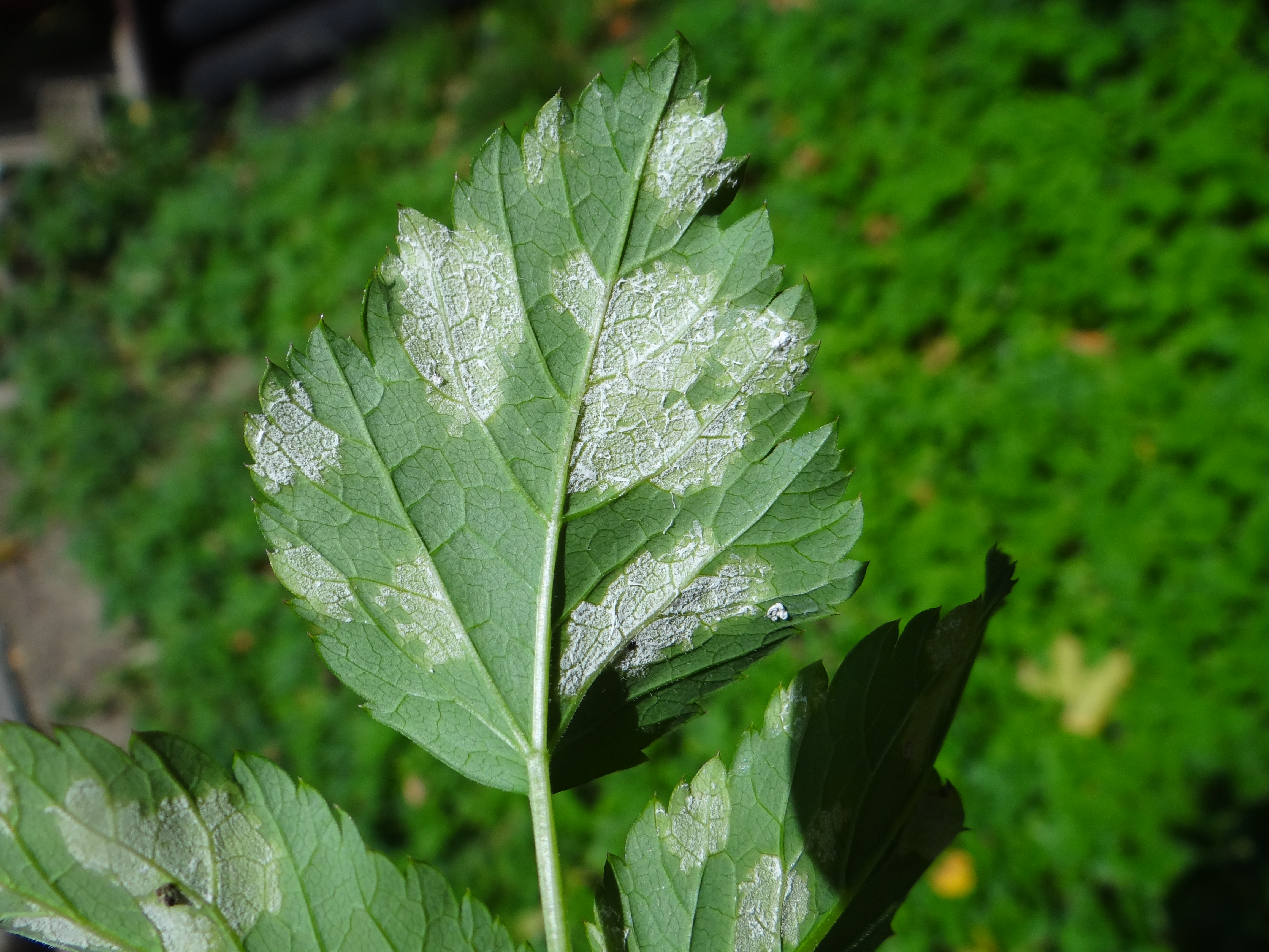 Plasmopara nivea on Aegopodium podagraria (location: Polanmd, Pieniny, Dolina Białej Wody)